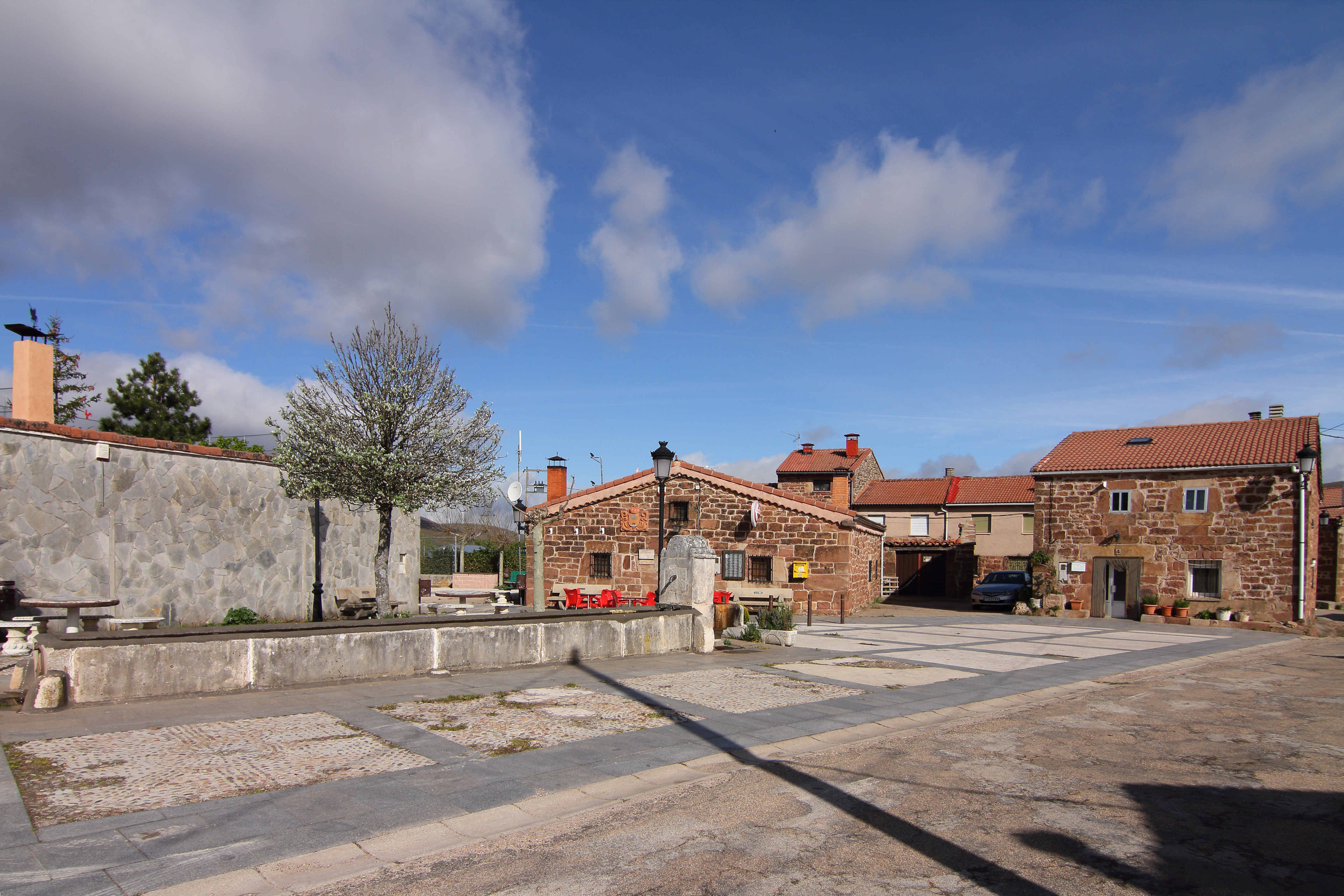 Villamiel de la Sierra, fuente y Casa Consitorial